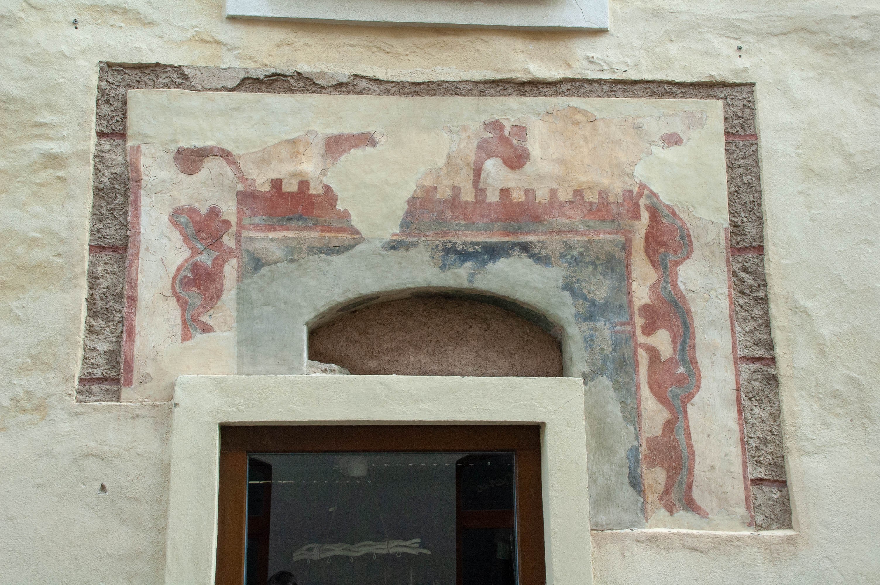 Poštovní 119, Prachatice